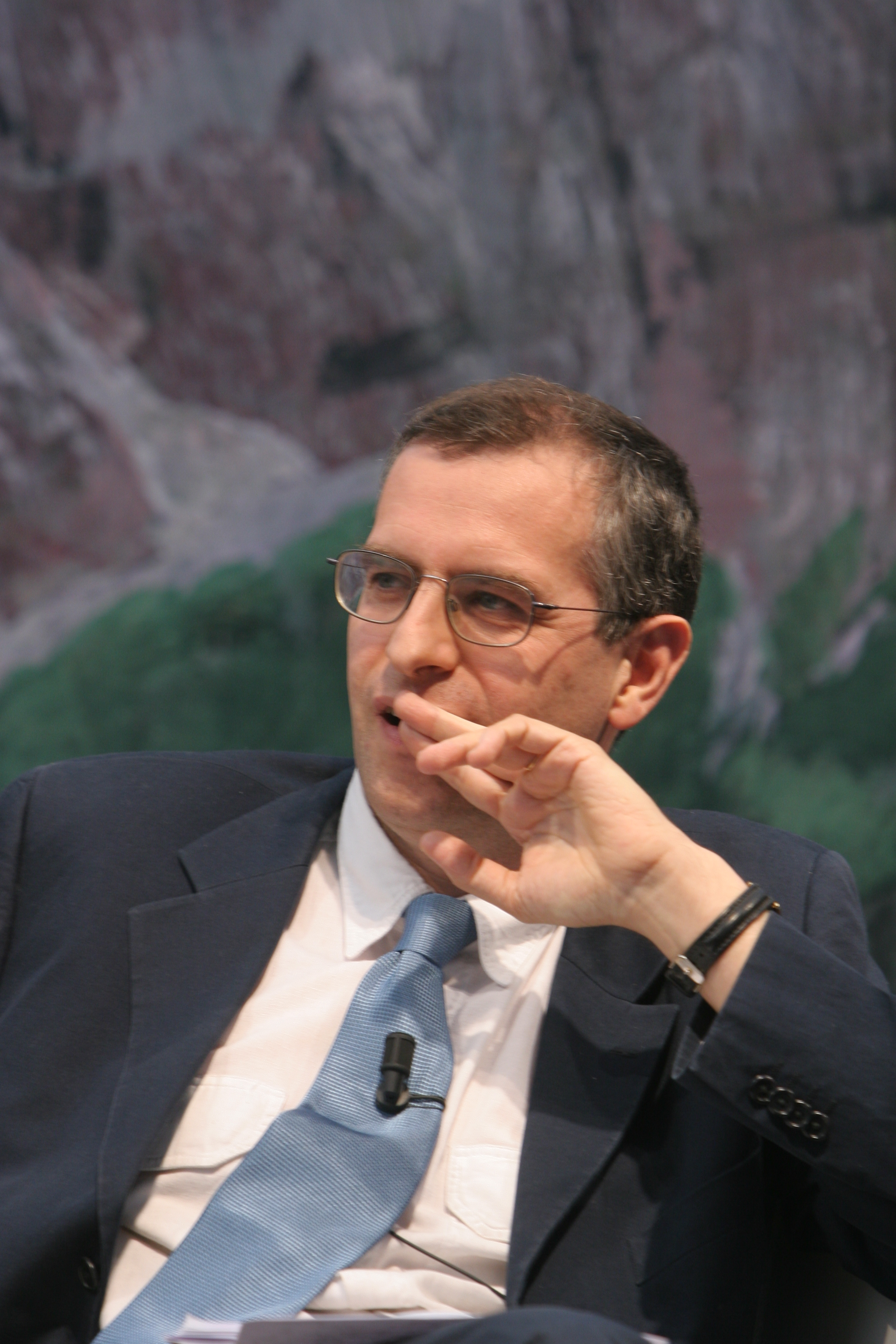 Carlo Lottieri, philosopher